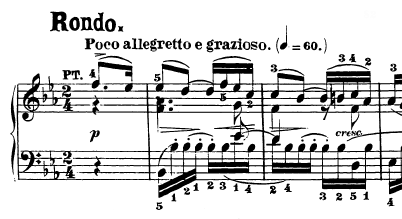 Compassos iniciais do quarto movimento da Sonata Op. 7 de Beethoven